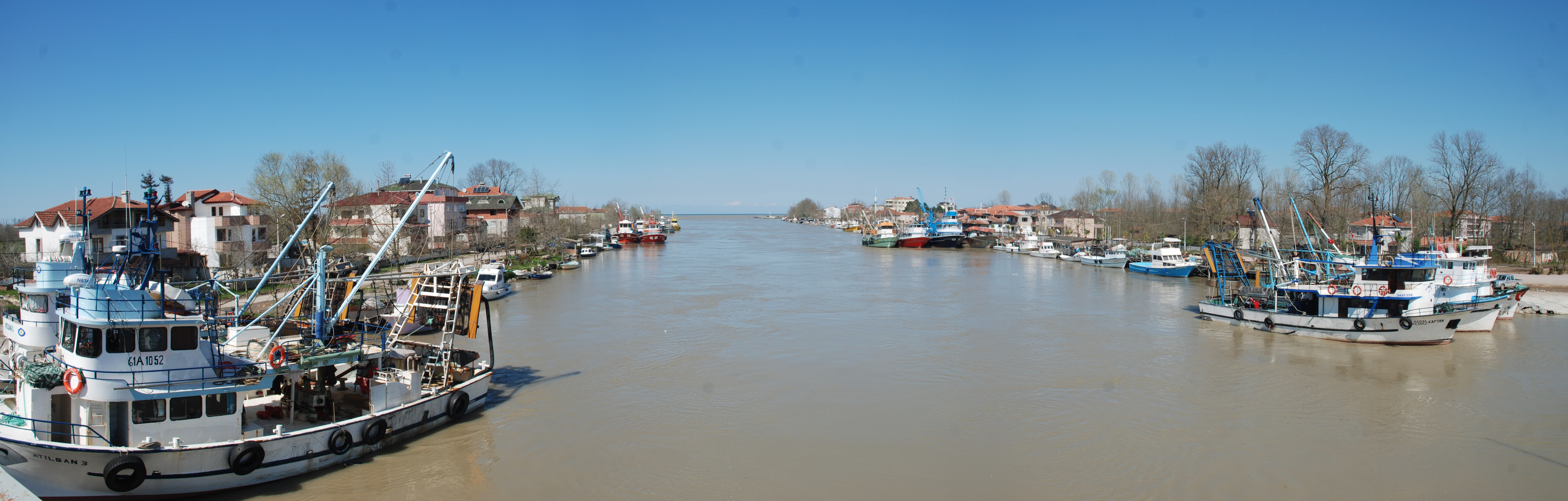 Sakarya Nehri'nin Karadeniz'e döküldüğü ağız kesimi. Yeni Mahalle, Karasu.